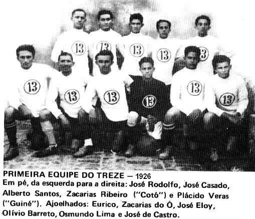 Primeira equipedo Treze 1926